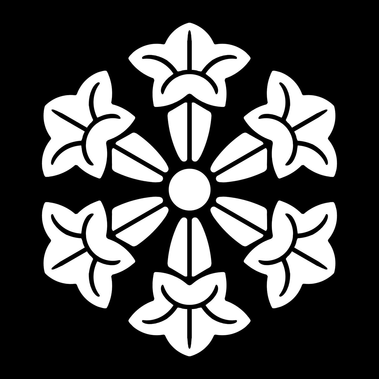 「六つ龍胆車」紋（染抜）